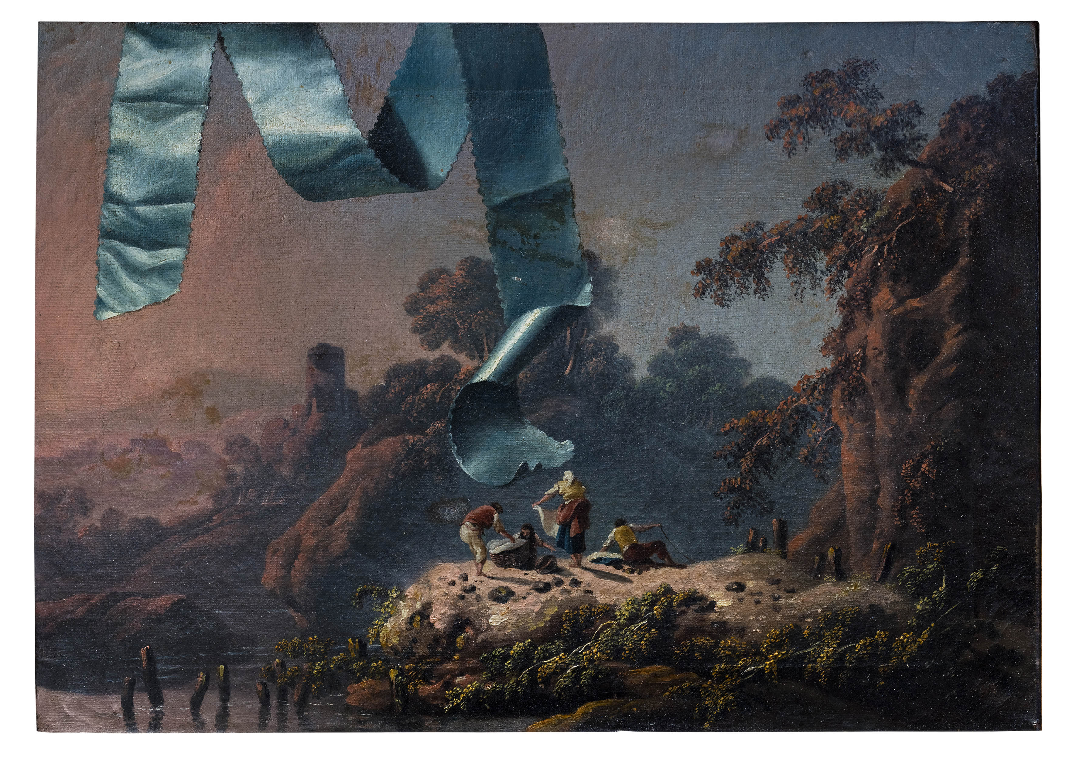 Jean PILLEMENT, Lyon, France, 1728 - 1808, Trompe l'oeil avec ruban turquoise devant le paysage de la campagne portugaise, Huile sur sa toile, collection particulière, Paris